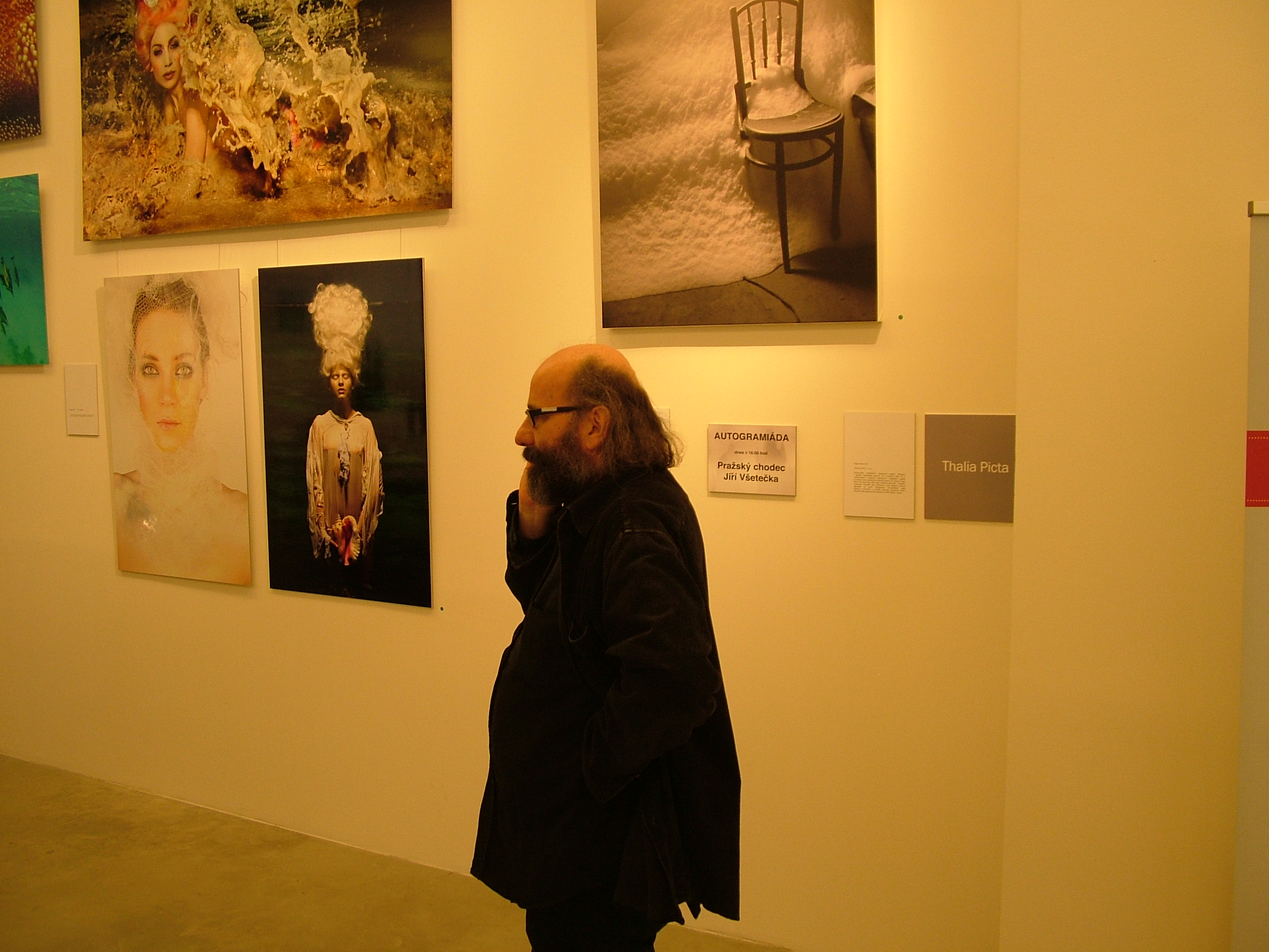 Prague Photo Festival 2012